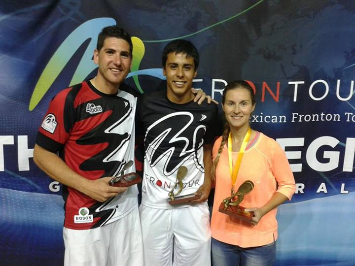 mxfrontour